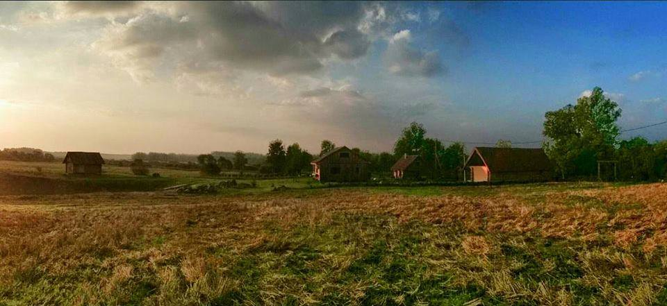 Mäeltoa talu